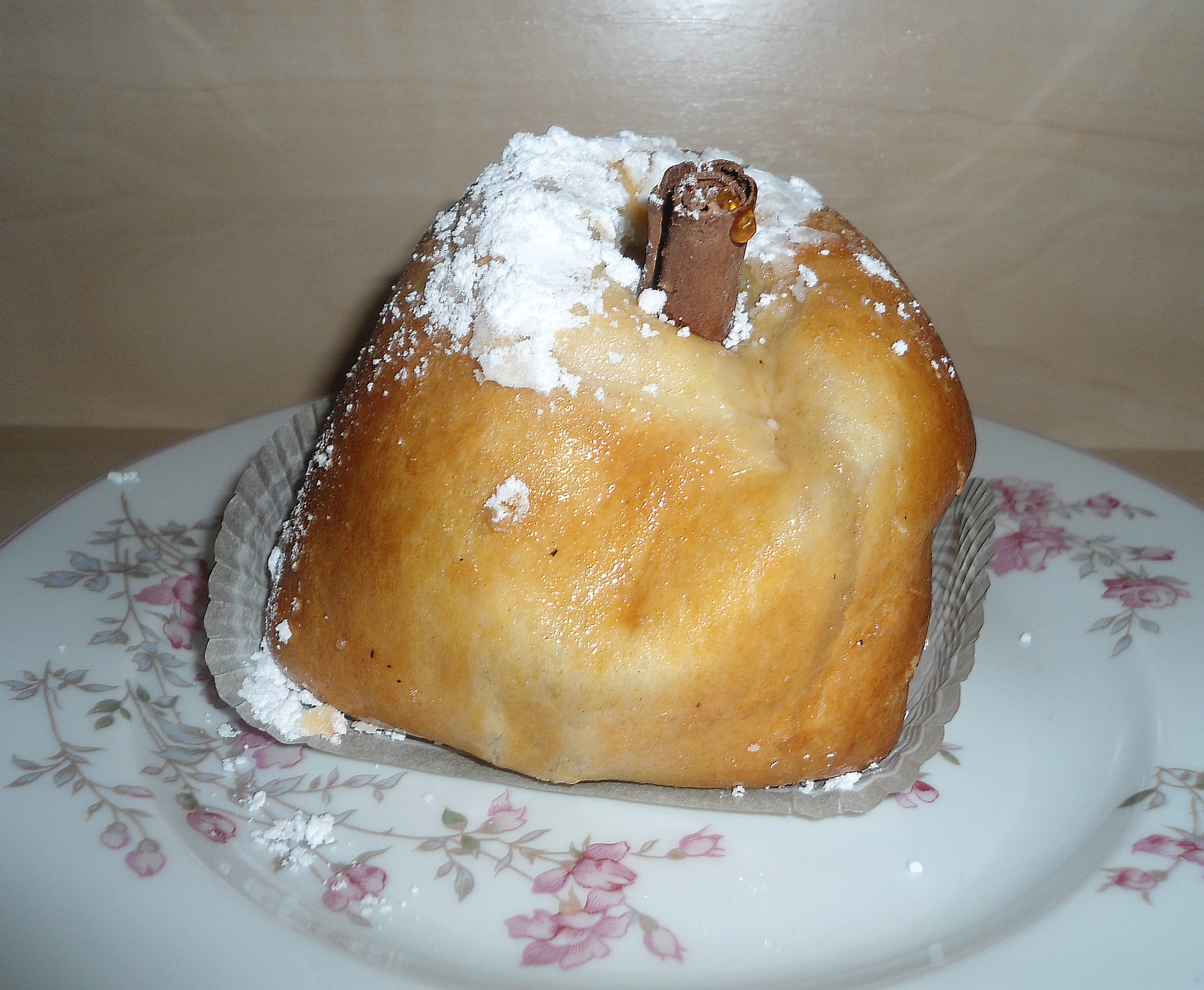 Rombosse pâtisserie de Verviers